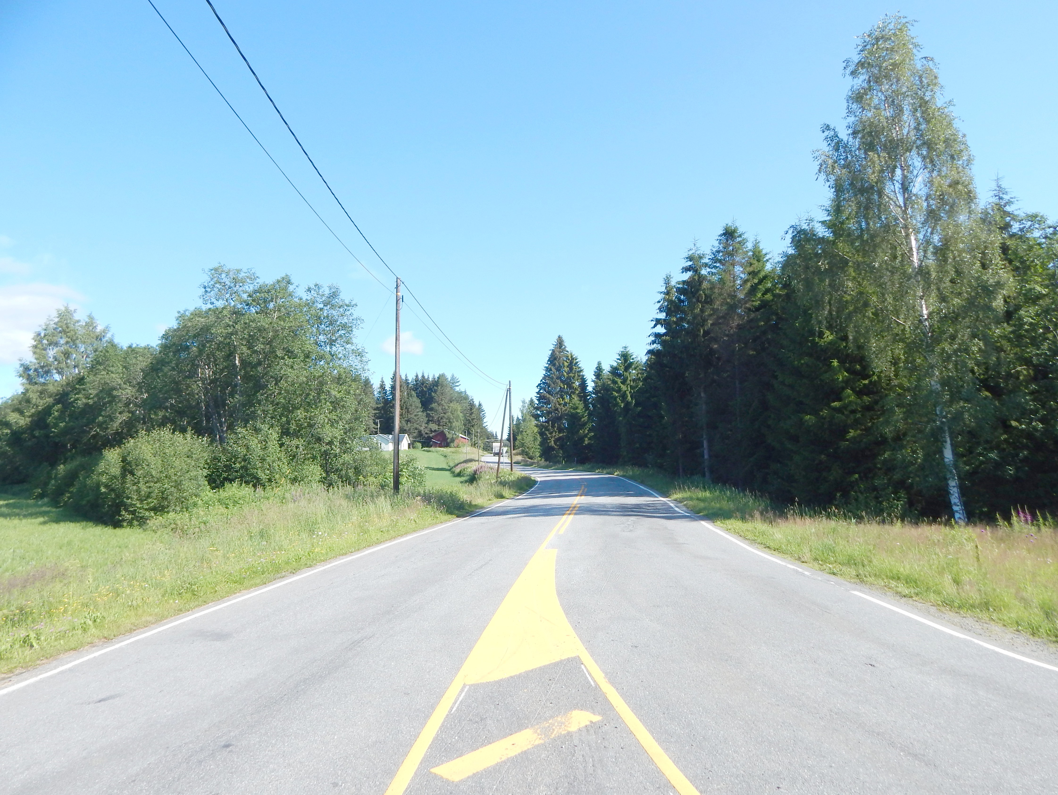 Heimdalsvegen i Løten